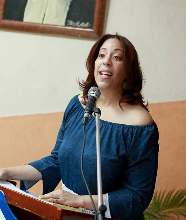 Jael Uribe, recital colegio La Salle. Octubre 2017